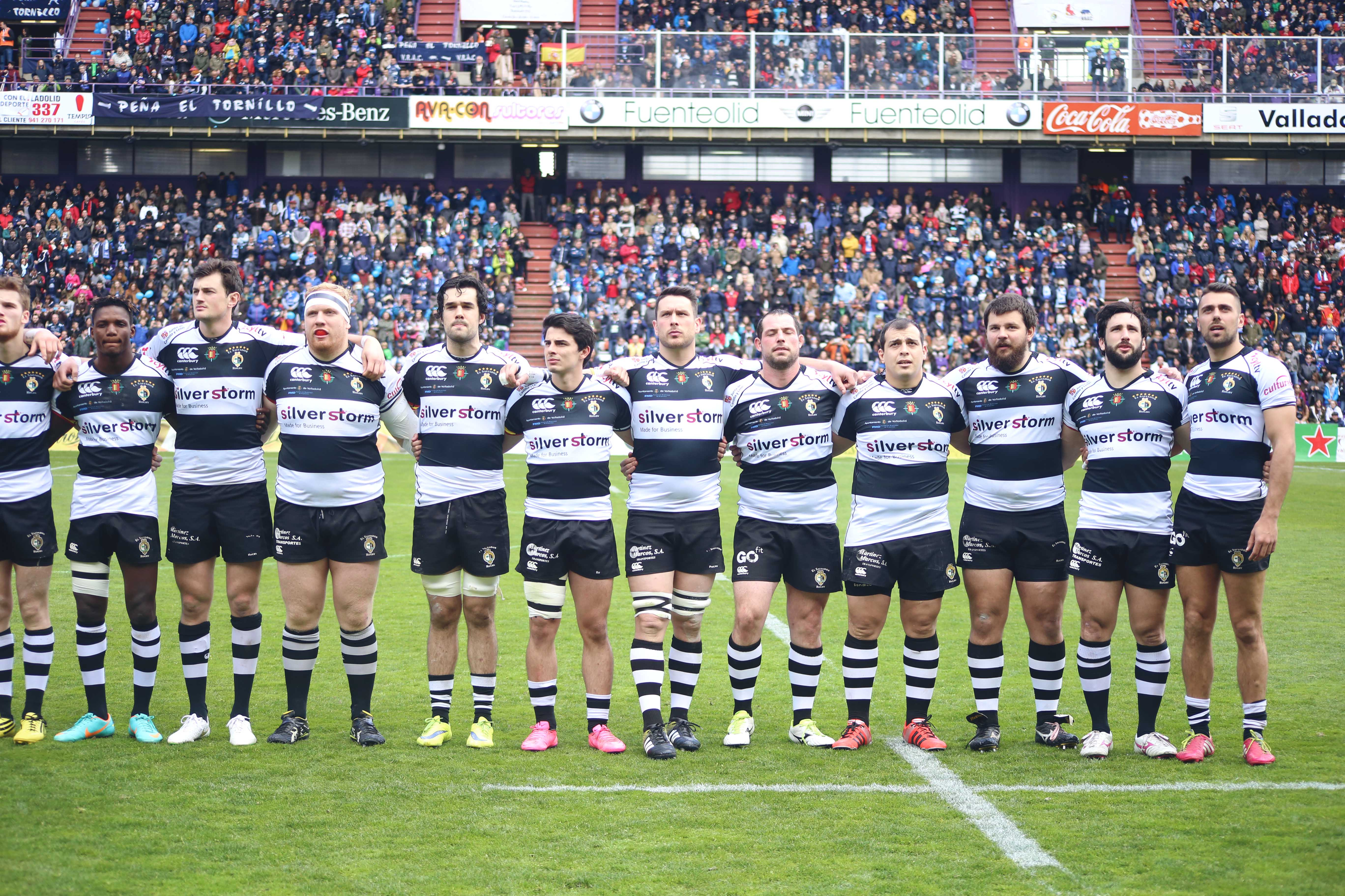 Final de la Copa del Rey de Rugby 2016